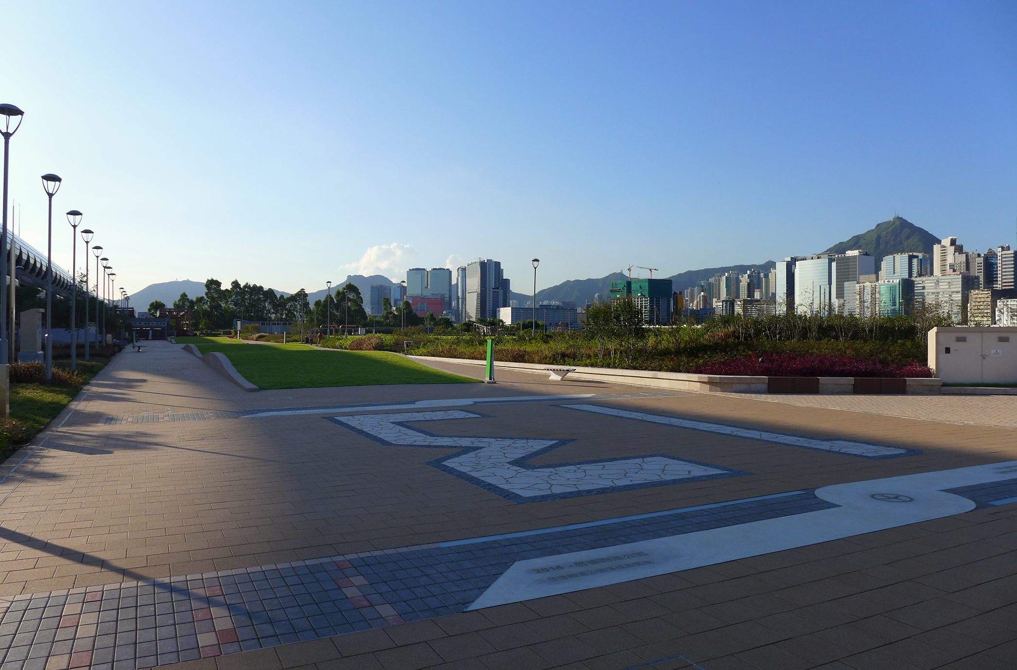 Kai Tak Runway Park